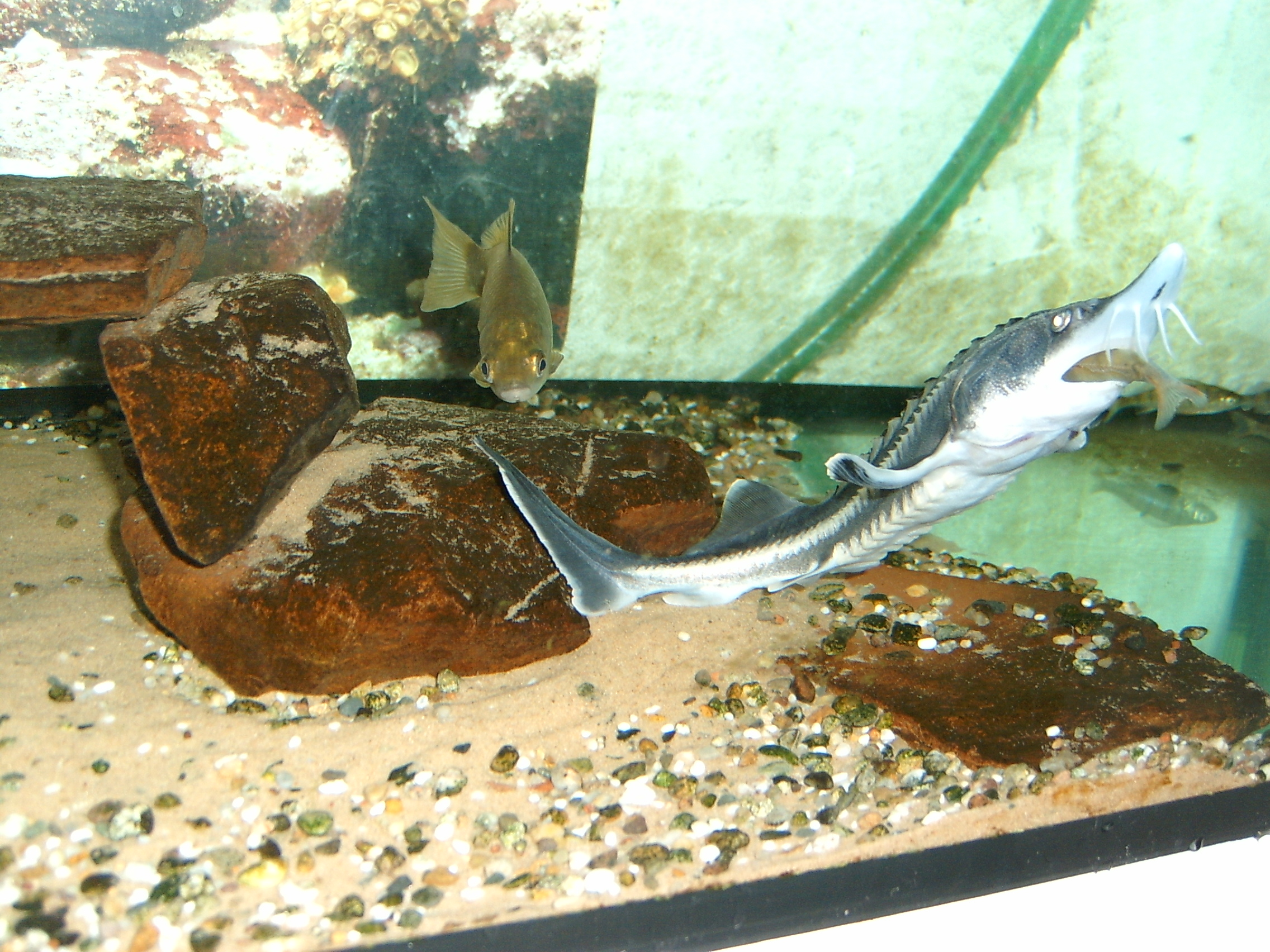 Huso huso L., Jungtier